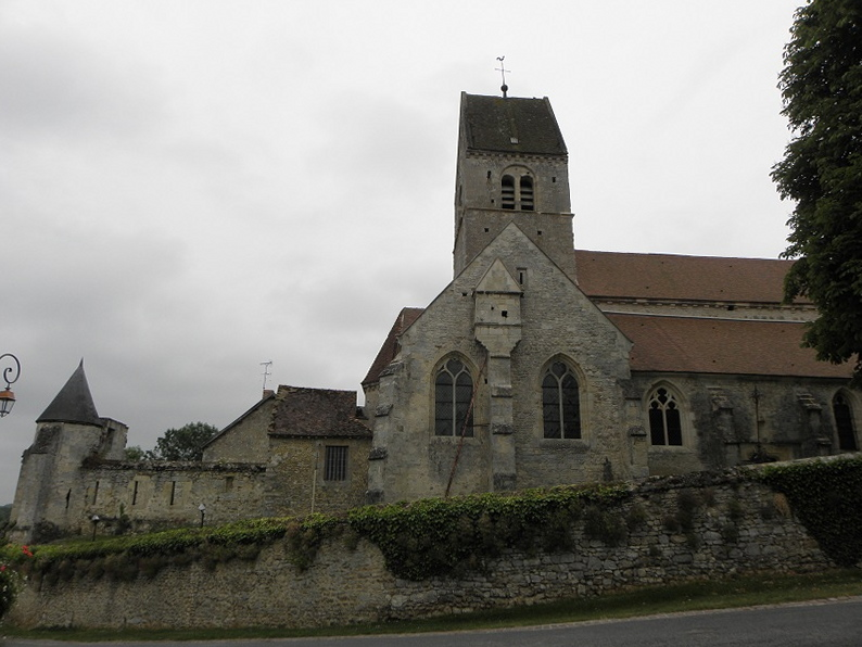 Vue d'ensemble de l'église Notre-Dame d'Arcis-le-Ponsart (51).